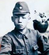 독립운동하다 숨진 19세 형이 돌아온 듯… 75세가 된 동생은 하염없이 눈물 흘렸다